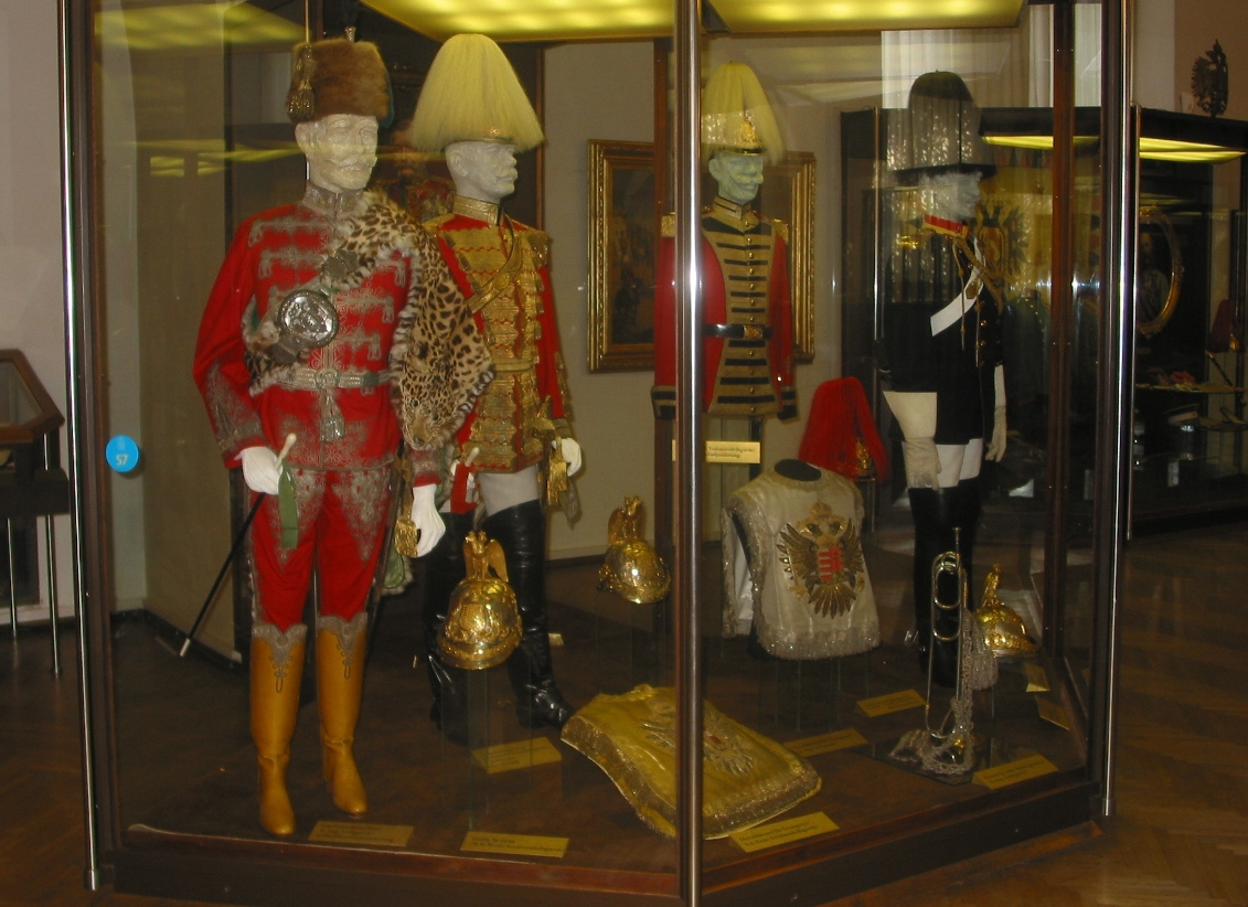 Uniformen der Leibgarden des Kaisers von Österreich (von links nach rechts: k.u. Leibgarde, Arcièren-Leibgarde, k.u.k. Trabantenleibgarde und k.u.k. Leibgardereitereskadron.